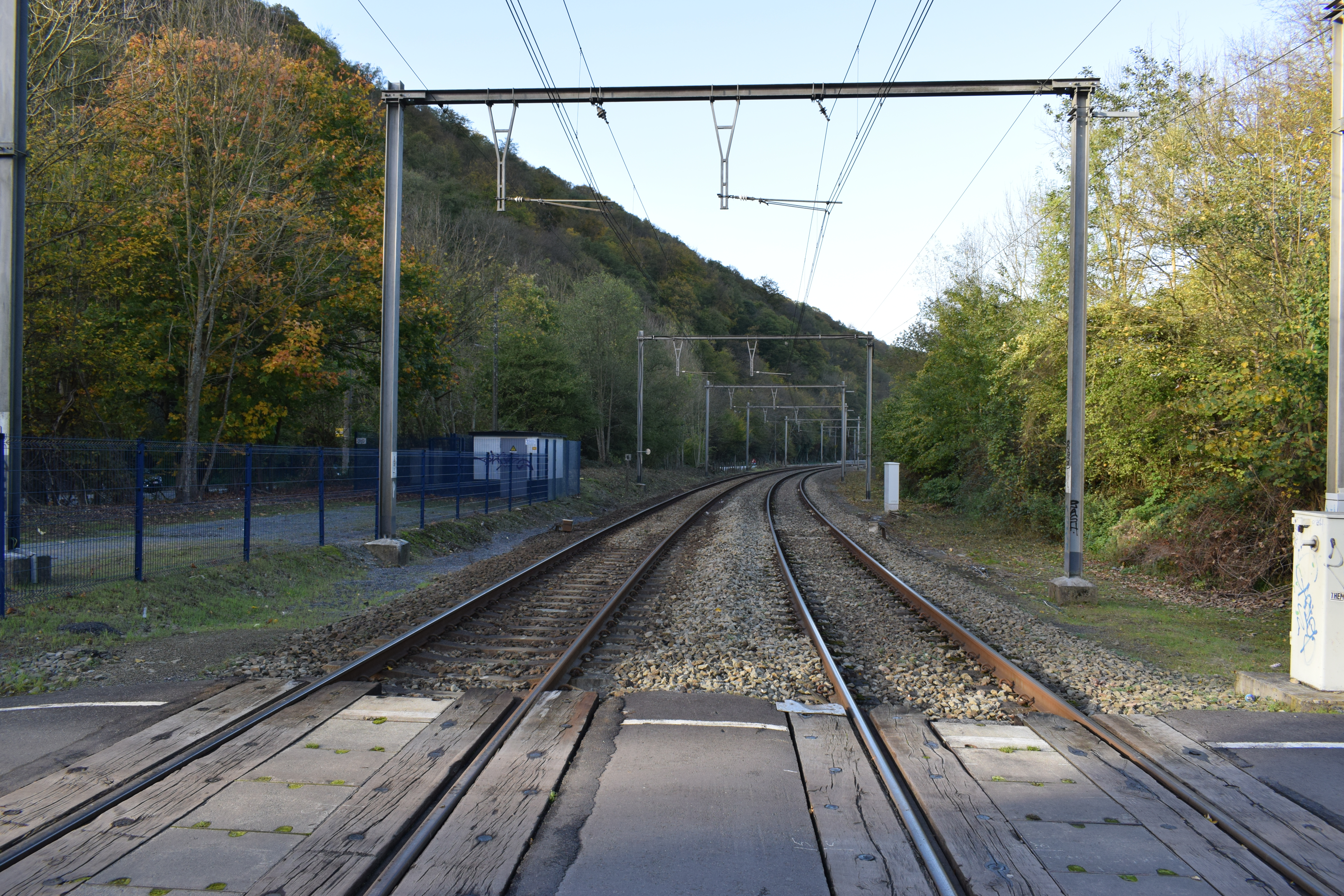 Vue de la ligne de chemin de fer de la vallée de l'Ourthe, au passage à niveau du pont-barrage de Colonster, sur la rive gauche de l'Ourthe..